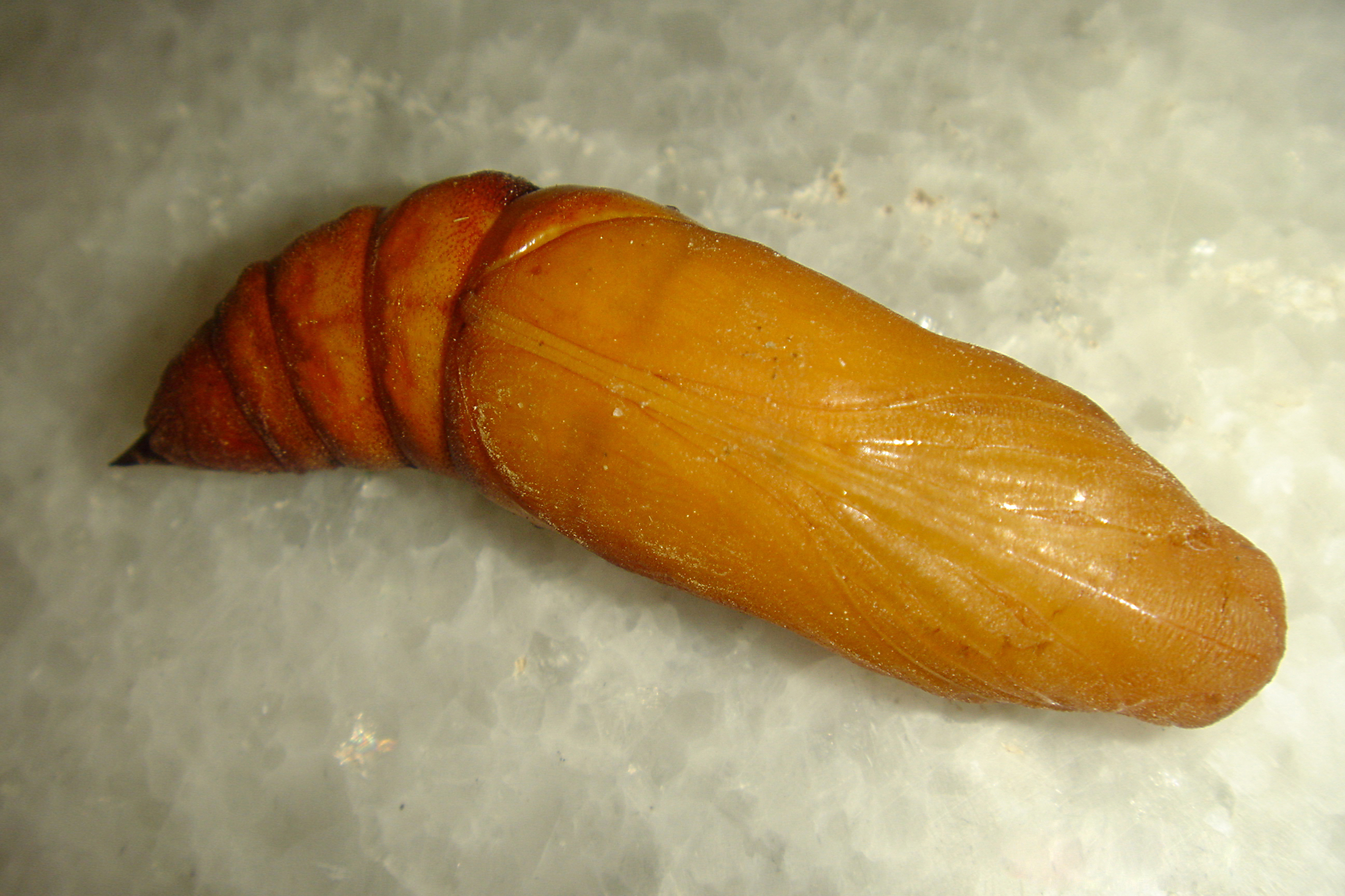 Hyles livornica (Pakistan, Islamabad) (Muhammad Ather Rafi) pupa 1